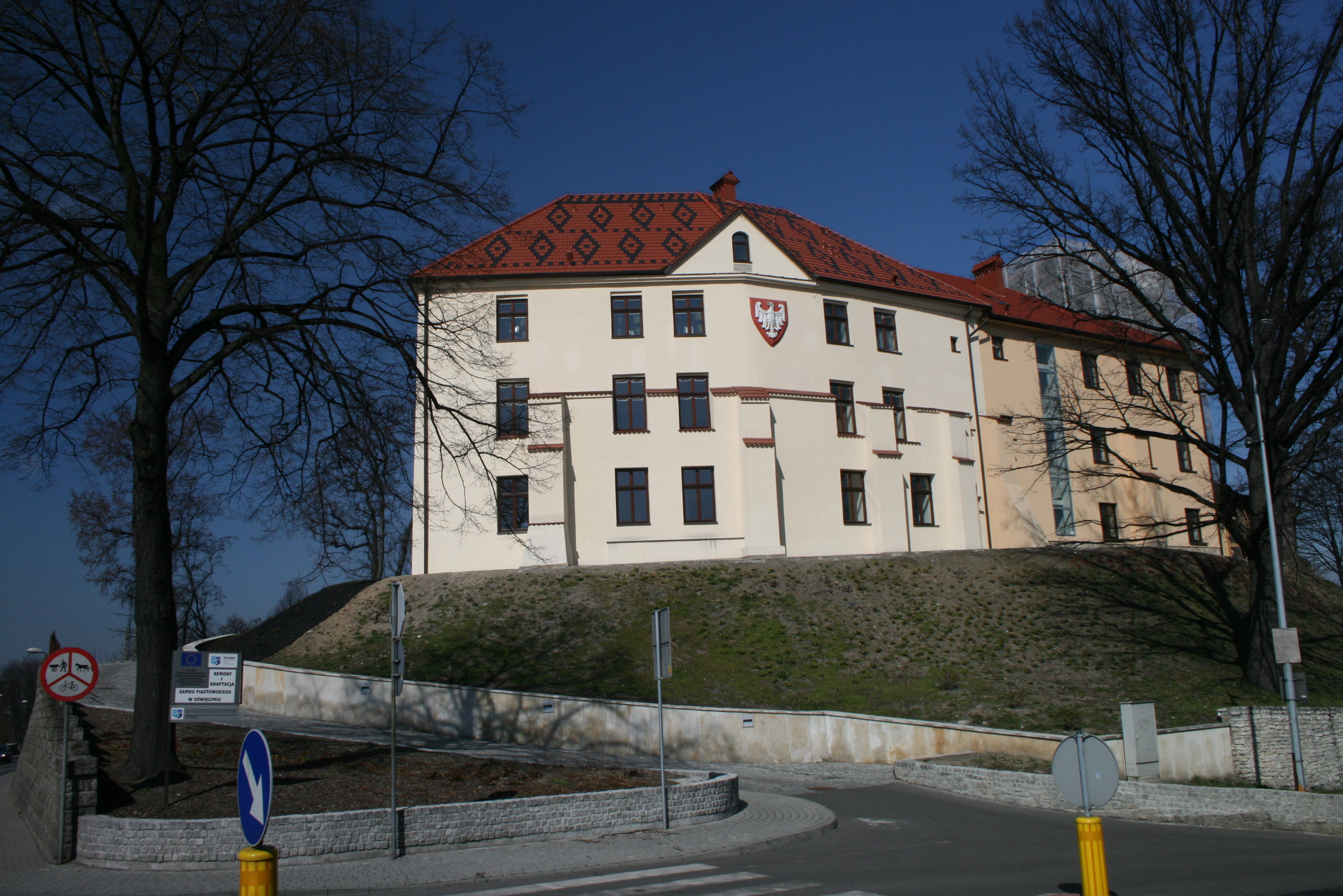 Zamek w Oświęcimiu (castle in Oświęcim)